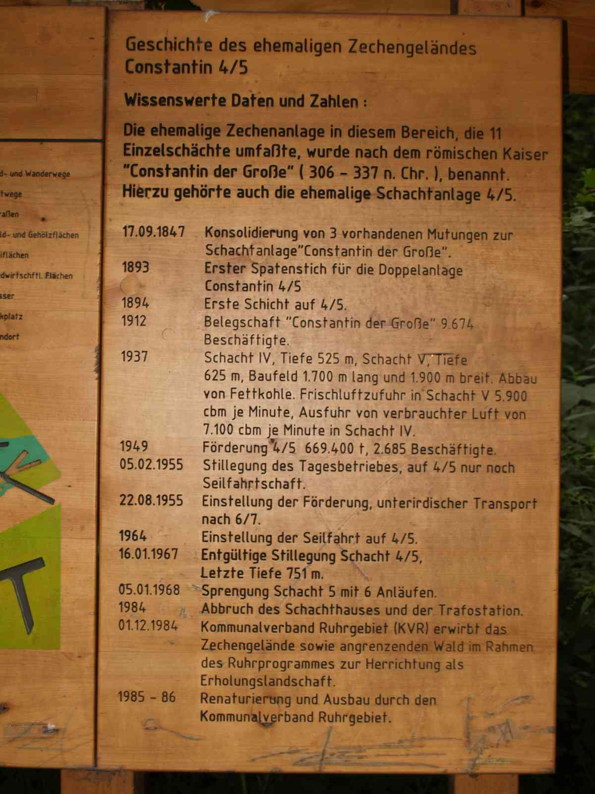 Texttafel Zeche Constantin